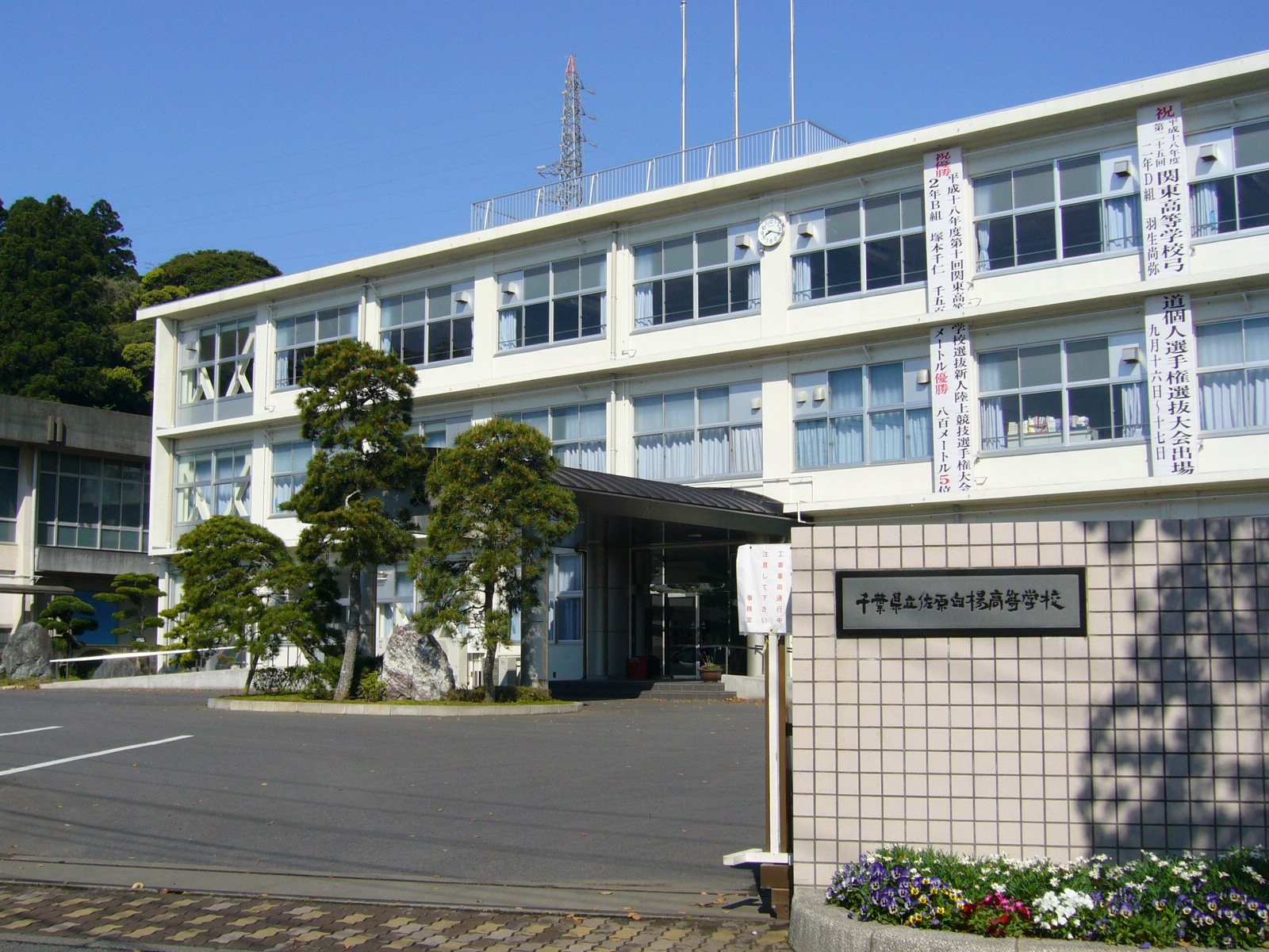 sawara hakuyou high-school,katori-city,japan